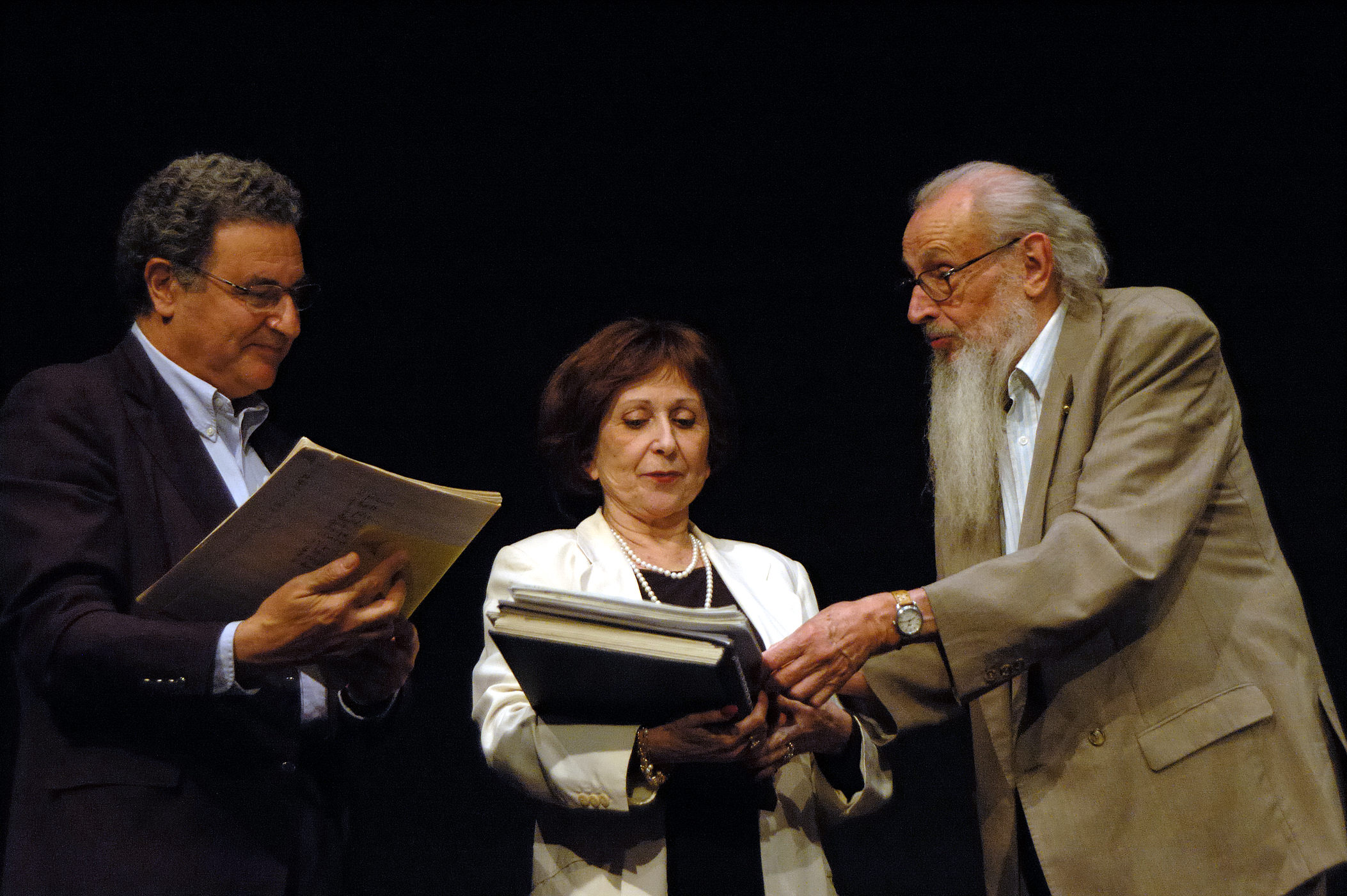 La Cinémathèque française recevant des partitions musicales d'Antoine Duhamel de ses propres mains pour l'ouverture de la rétrospective Mai 68.